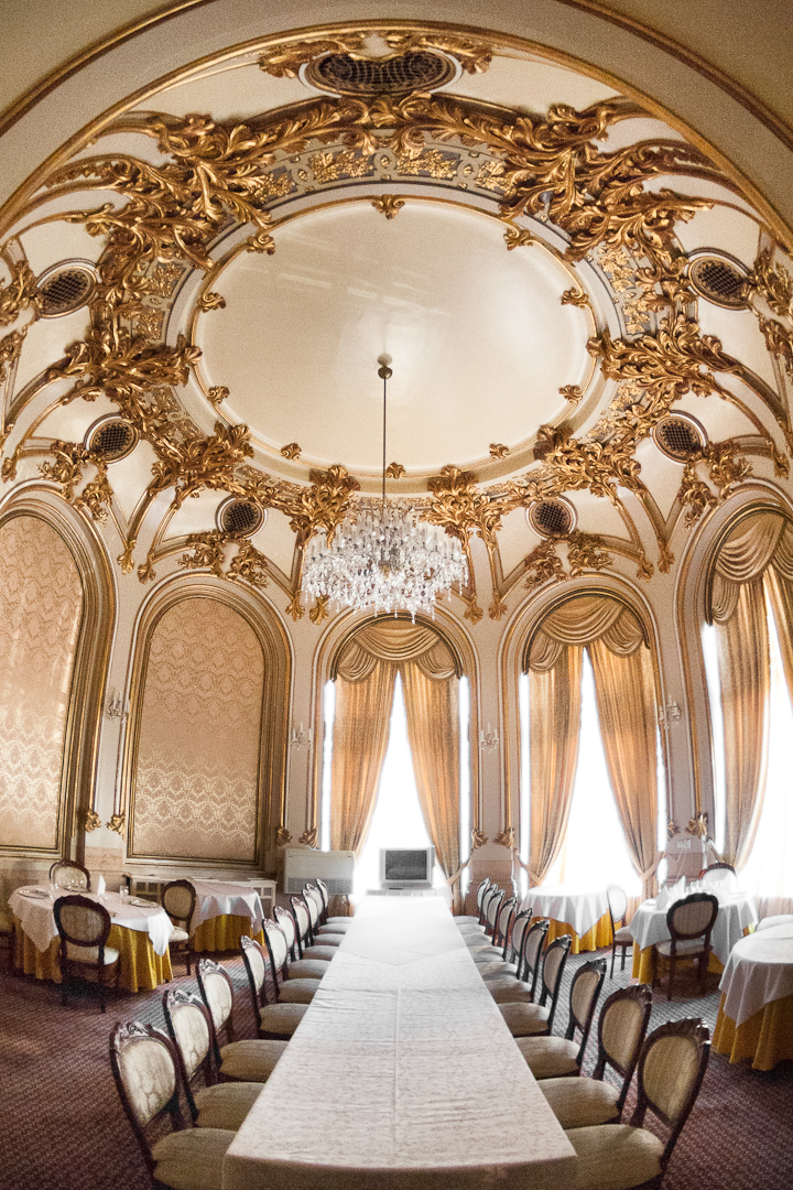 Interior - Cercul Militar National, Bucuresti